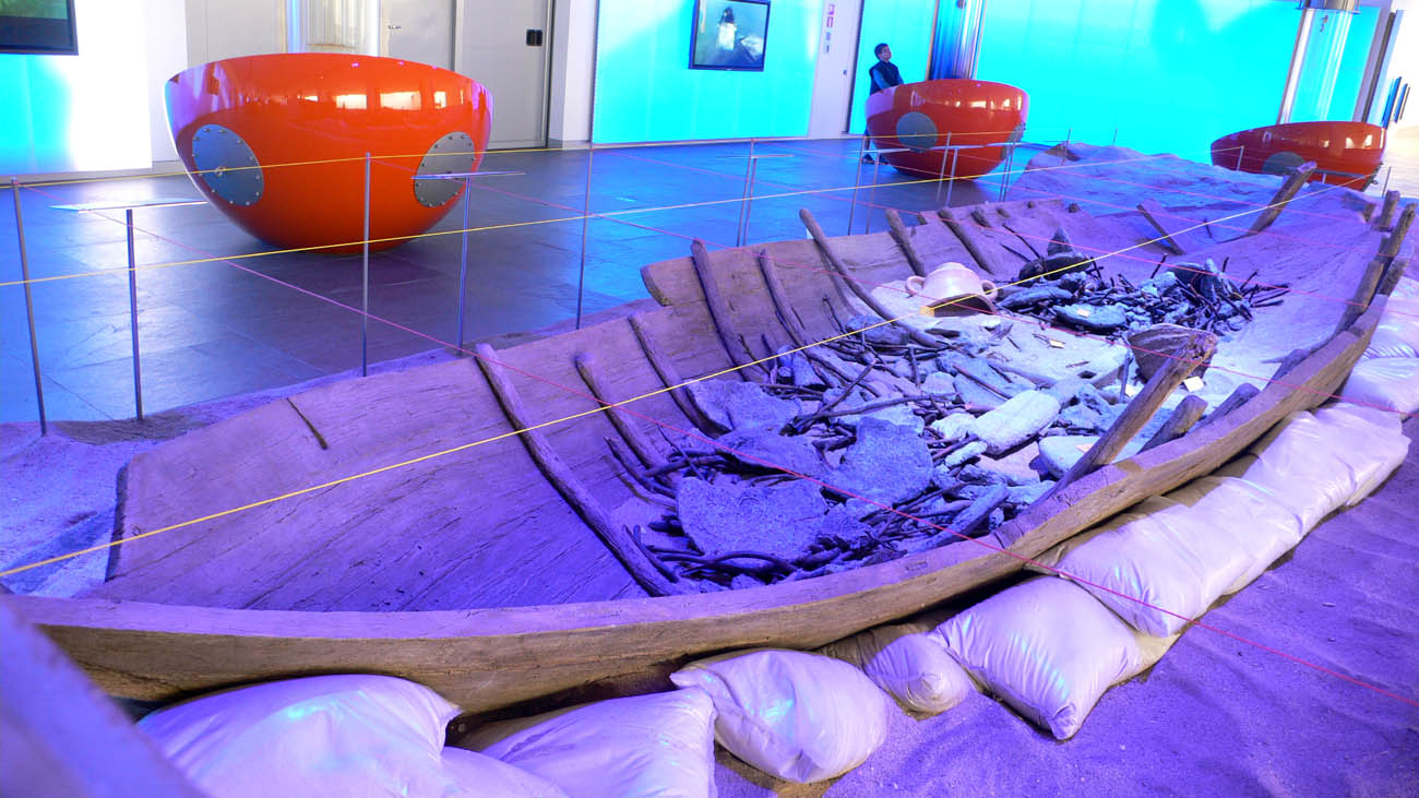 Reconstrucción del pecio fenicio Mazarrón II en el Museo Nacional de Arqueología Subacuática de Cartagena (ARQUA).